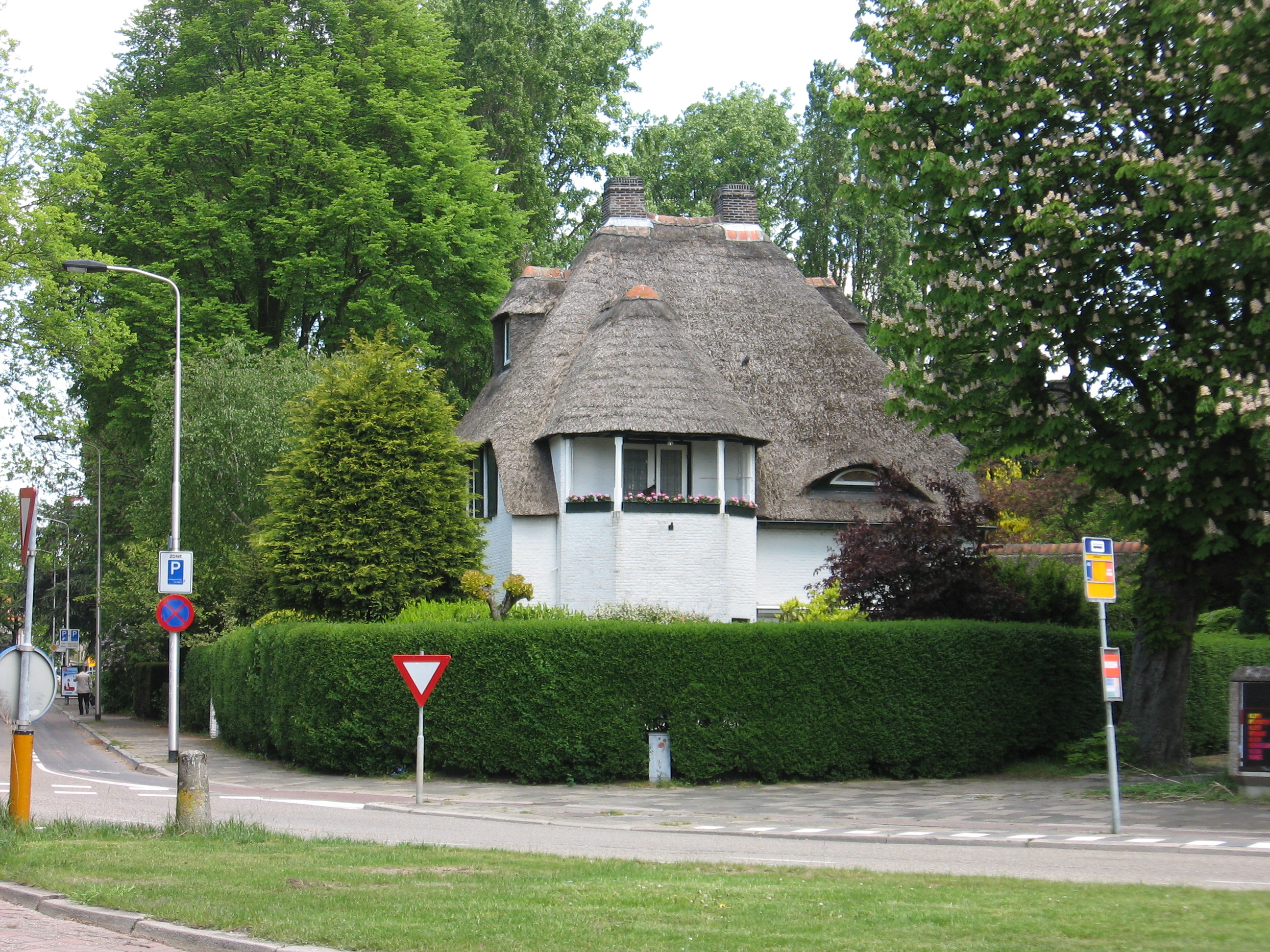 Delft - Onder 't Stroodak.jpg, rijksmonument (Julianalaan 156, Delft)